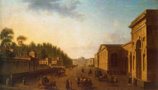 "Потемкинская улица" (справа - манеж Кавалергардского полка). Худ. Ф. Я. Алексеев. Ок. 1800